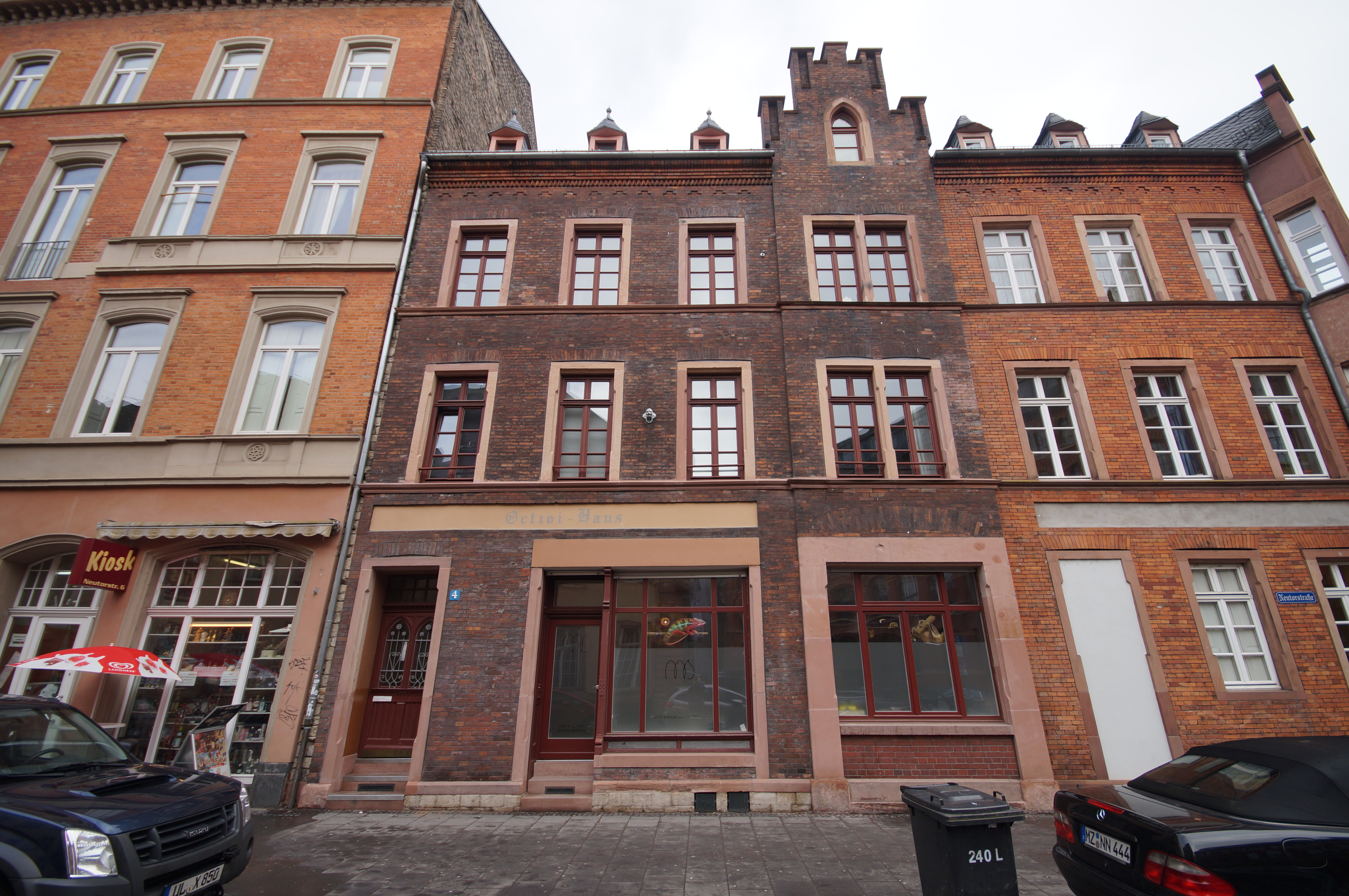 Die Fassade der Hausnummer 4 in der Neutorstraße in Mainz-Altstadt in der Denkmalzone Neutorstraße